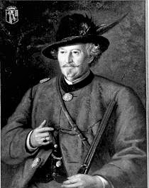 Carl Freiherr von Gienanth (1808-1890), bayerischer Adliger und Industrieller